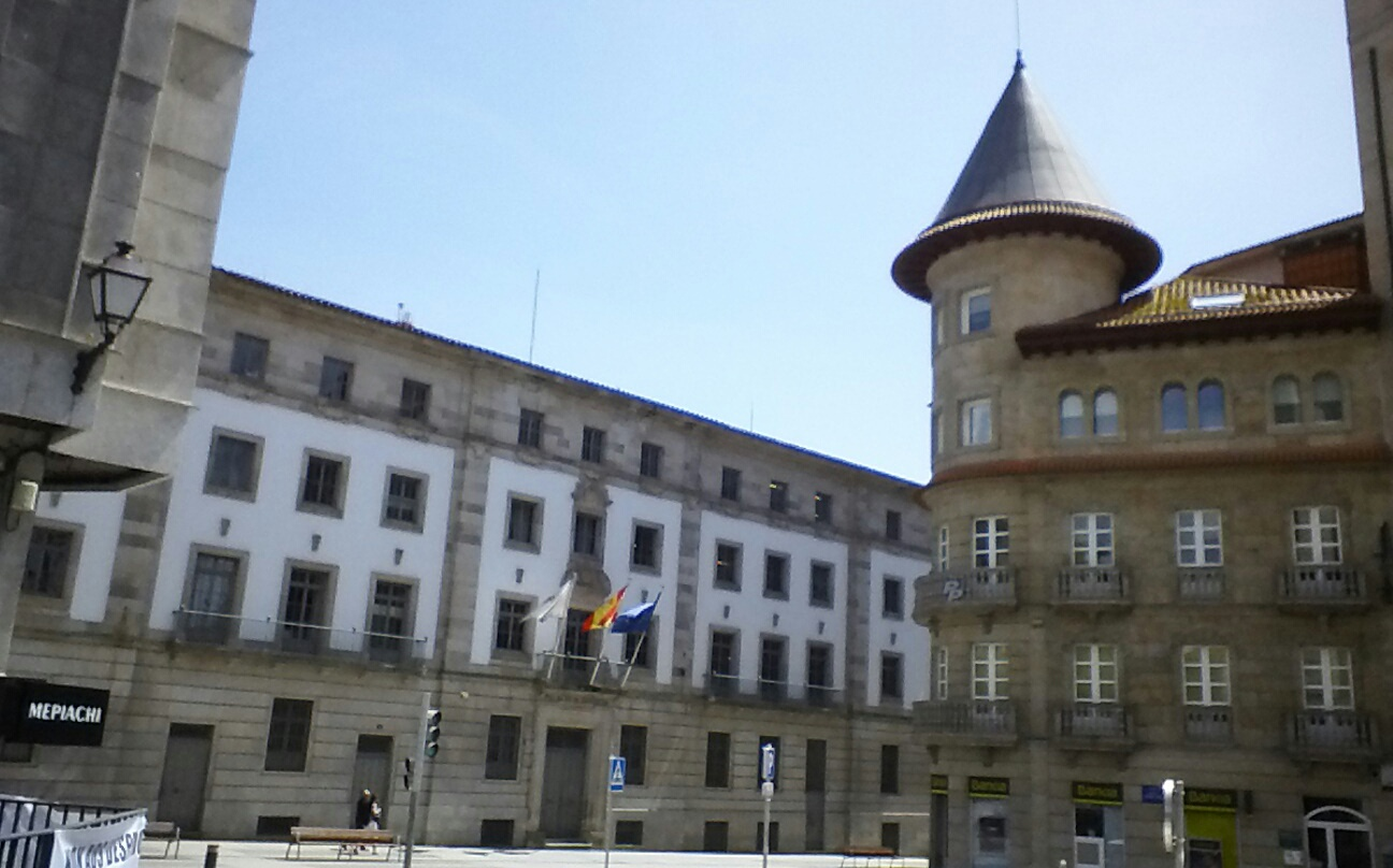 Palacio de Justicia, sede de la Audiencia Provincial en Pontevedra capital